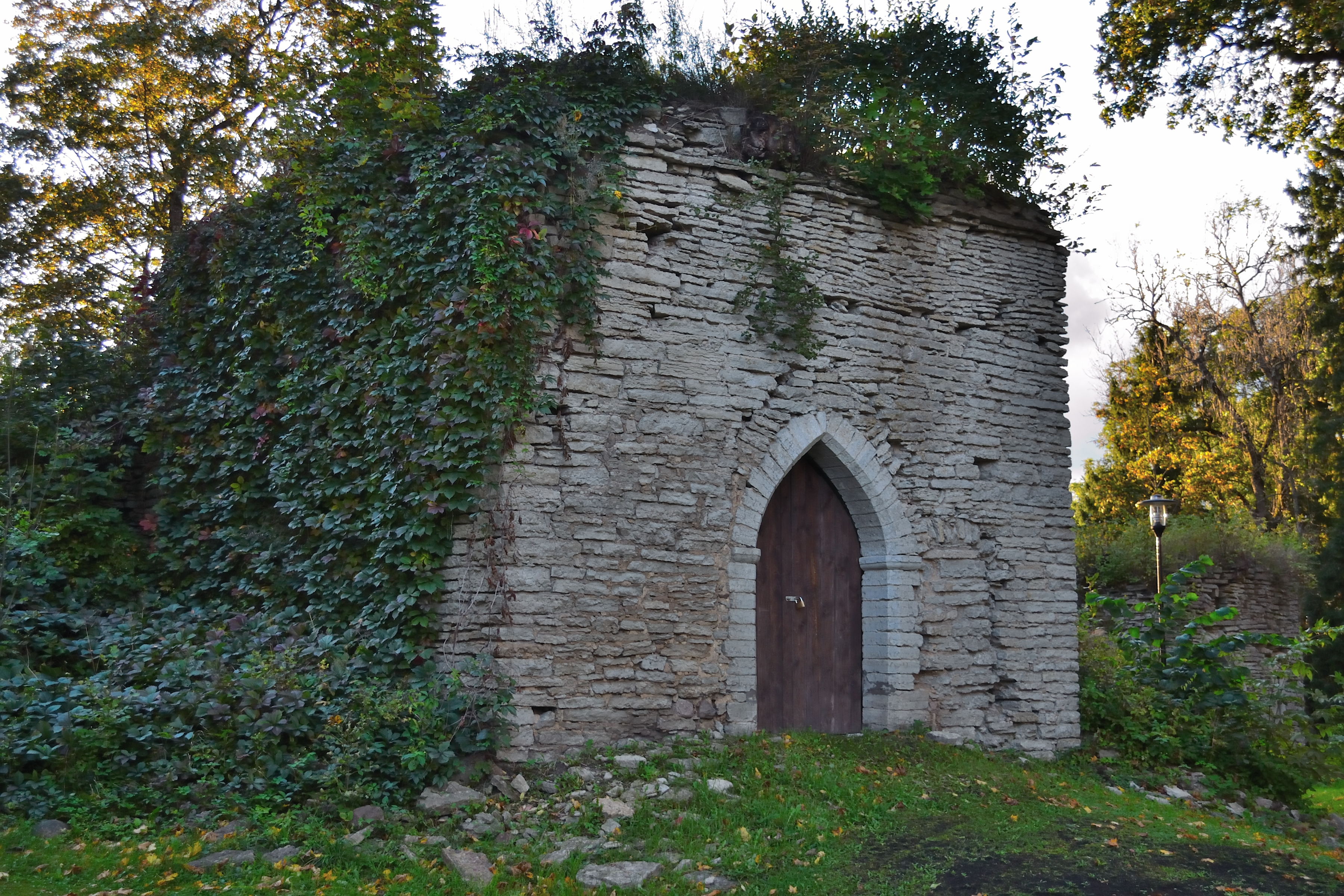 Vääna linnuse varemed, 19.saj